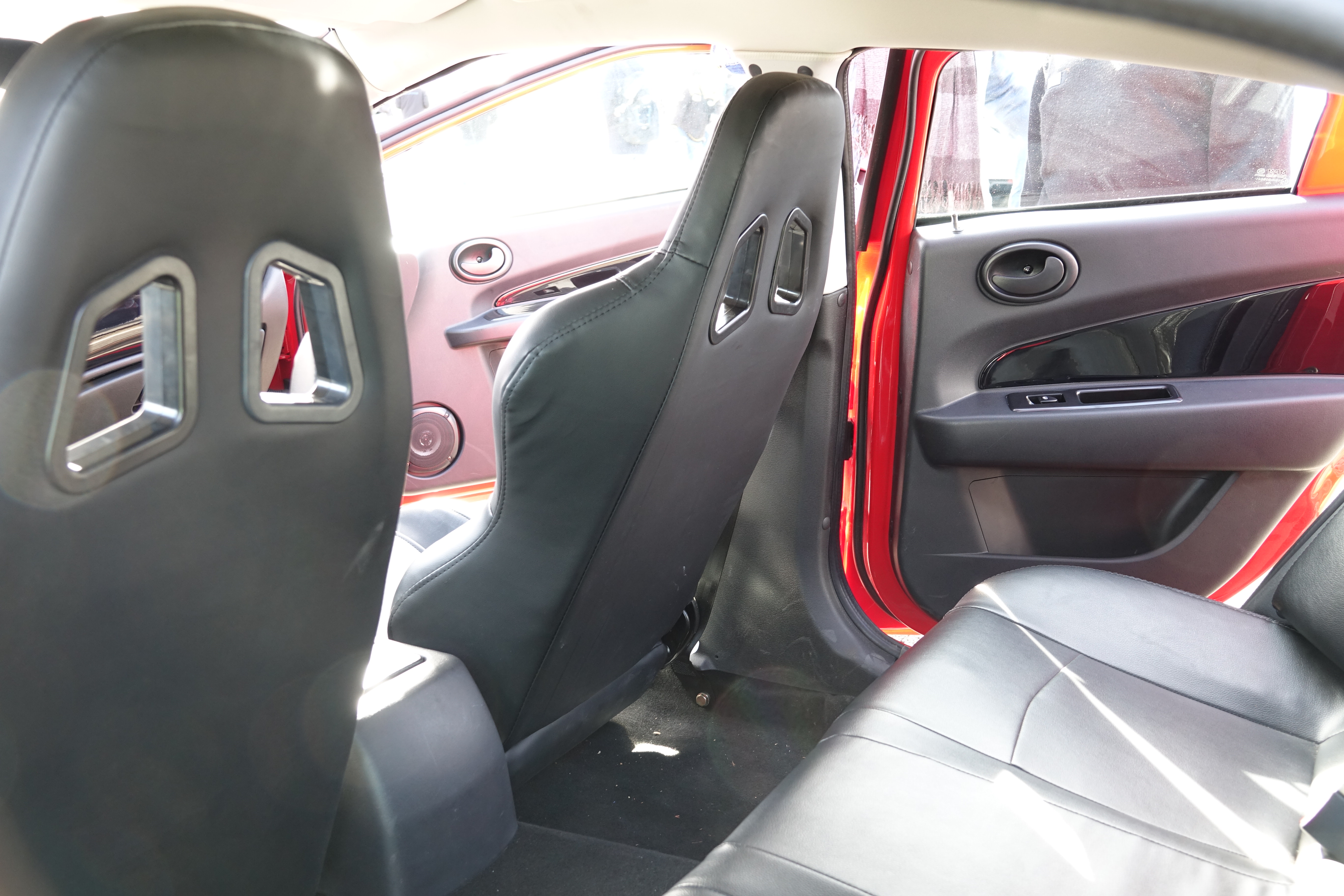 MPM Erelis aux Grandes Heures Automobiles 2018